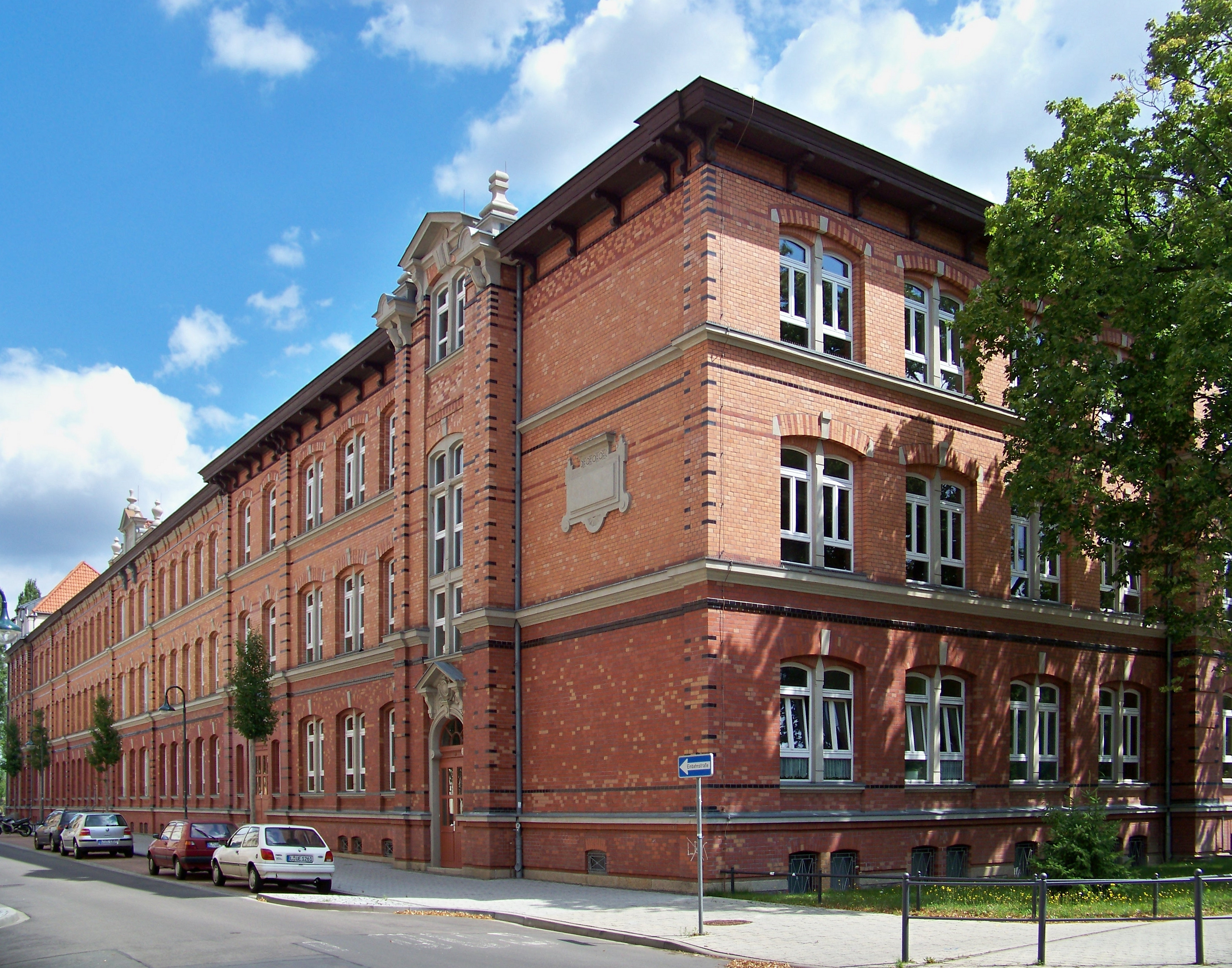 Mittelschule in Markranstädt bei Leipzig